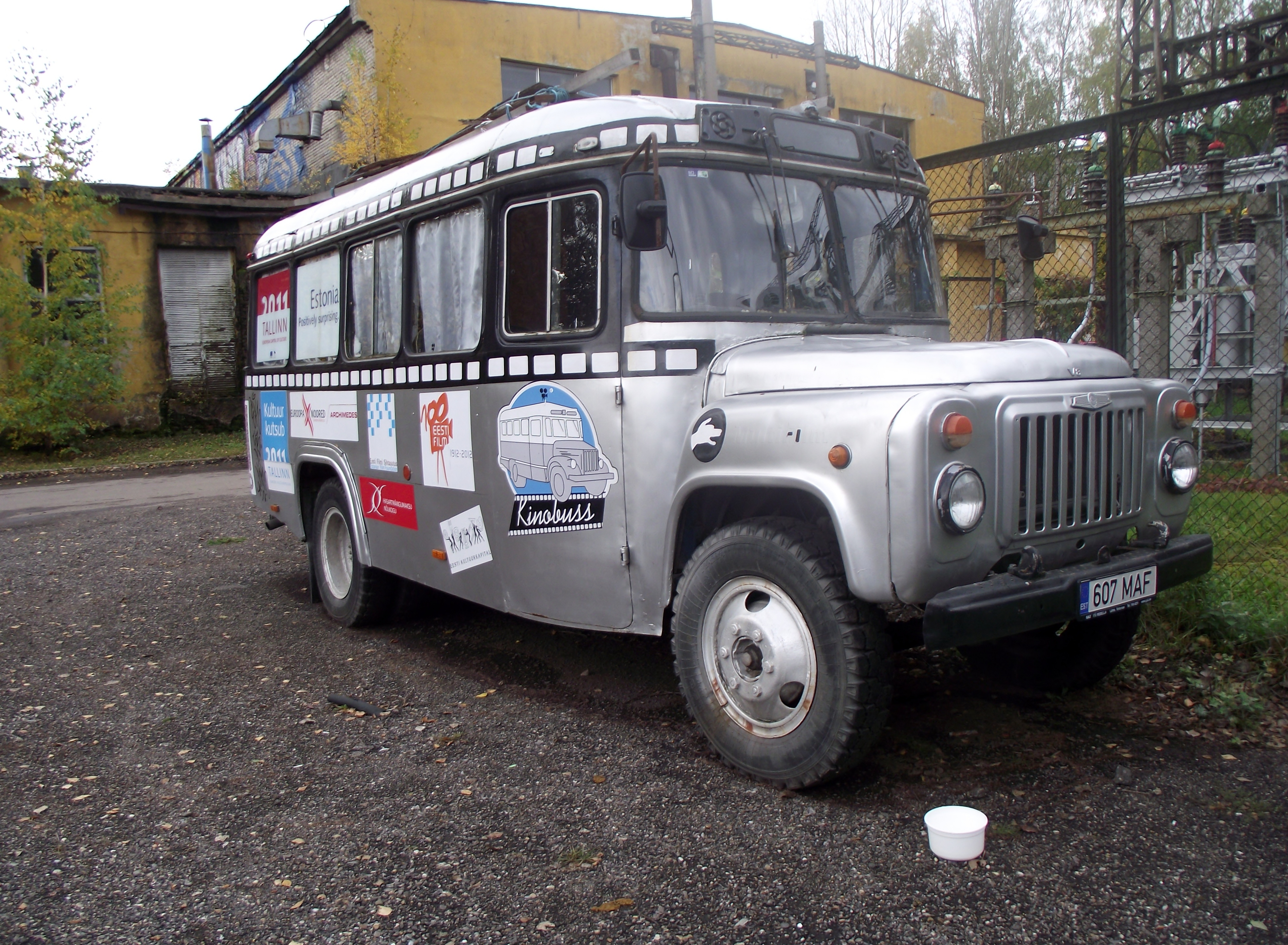 Kinobuss parkimas Telliskivi loomelinnakus